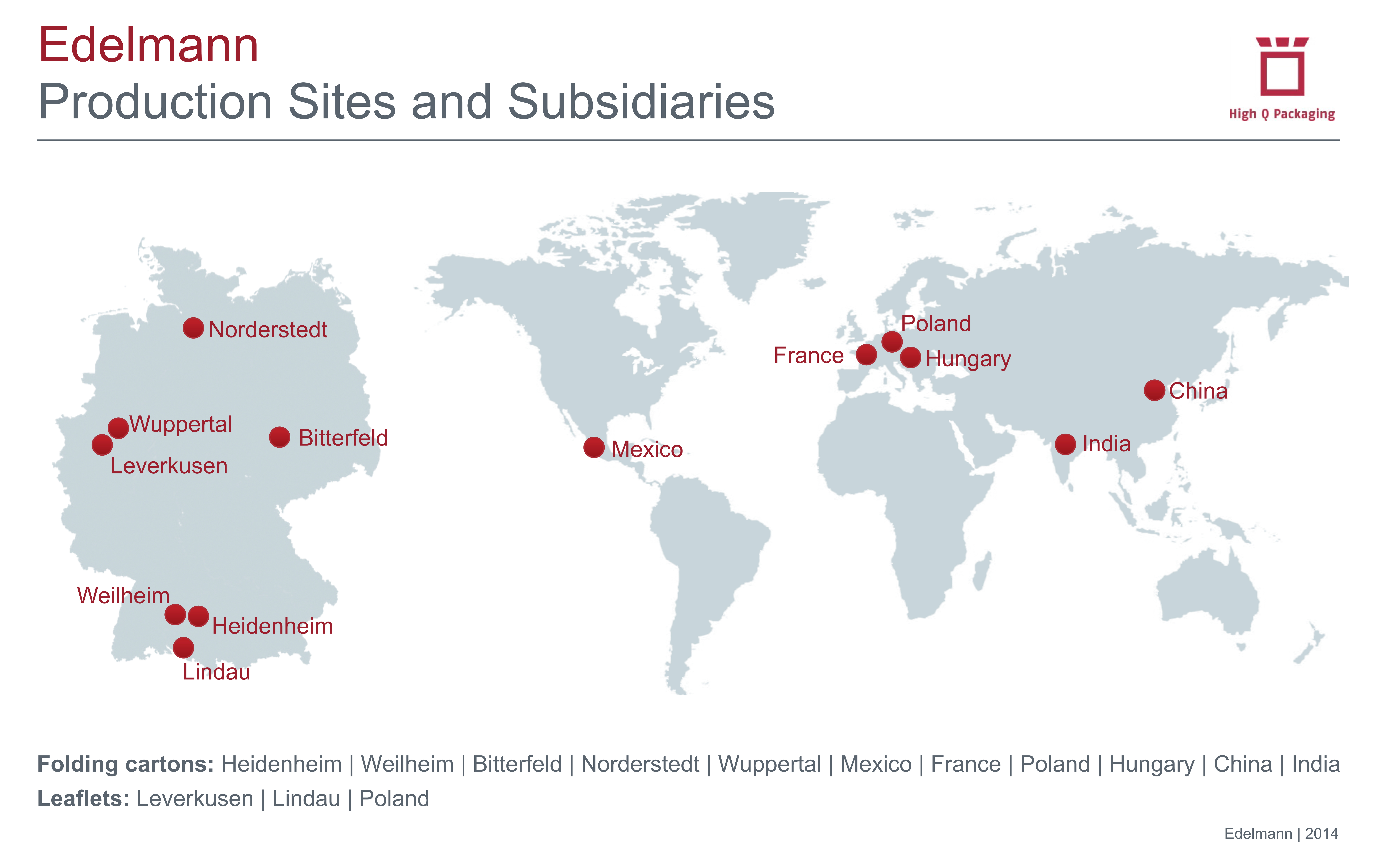 Edelmann Standorte